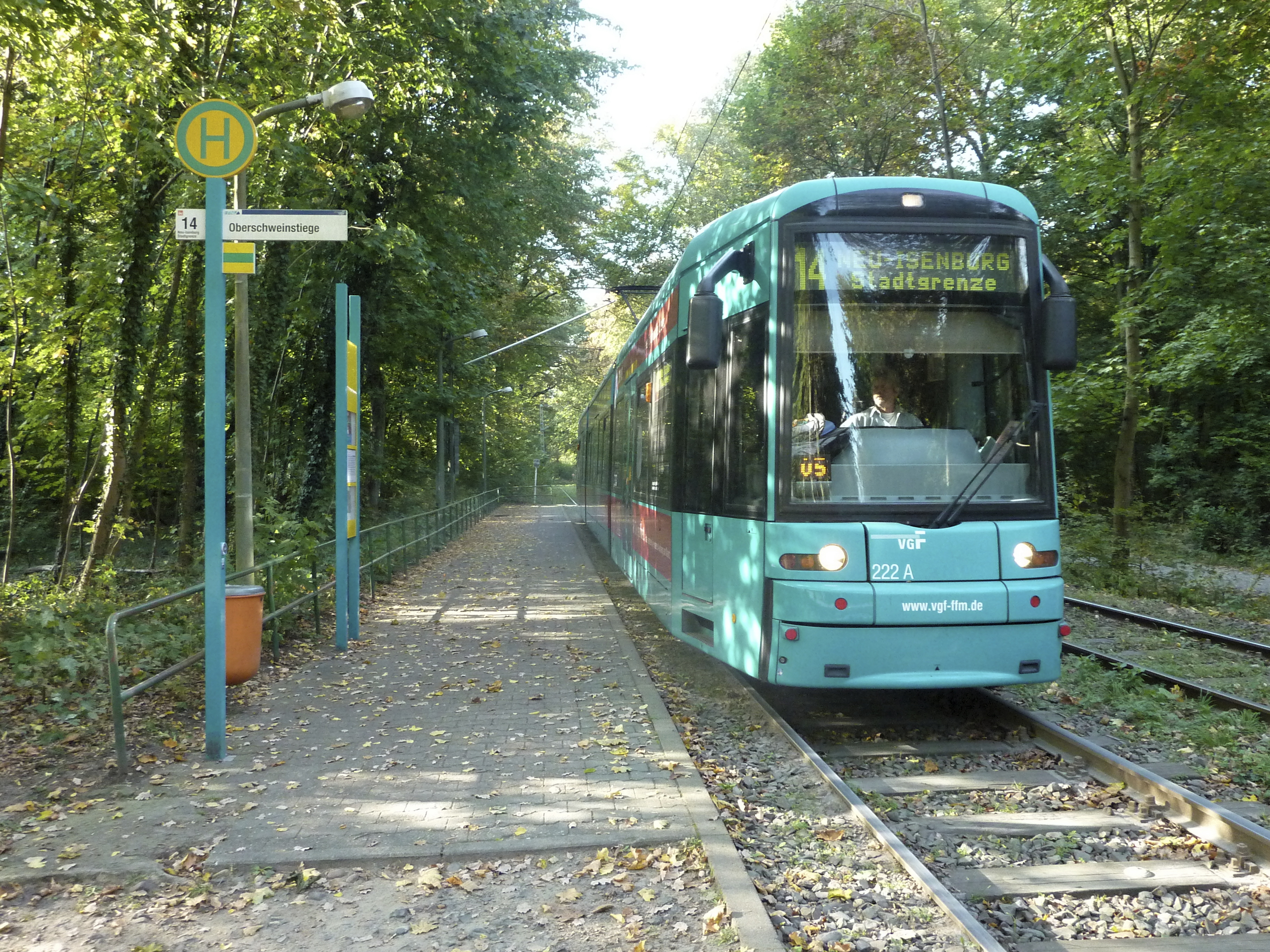 Frankfurt am Main, Stadtwald: Straßenbahnzug der Frankfurter Waldbahn; S-Wagen der Linie 14 an der Haltestelle Oberschweinstiege in Richtung Stadtgrenze/Neu-Isenburg.